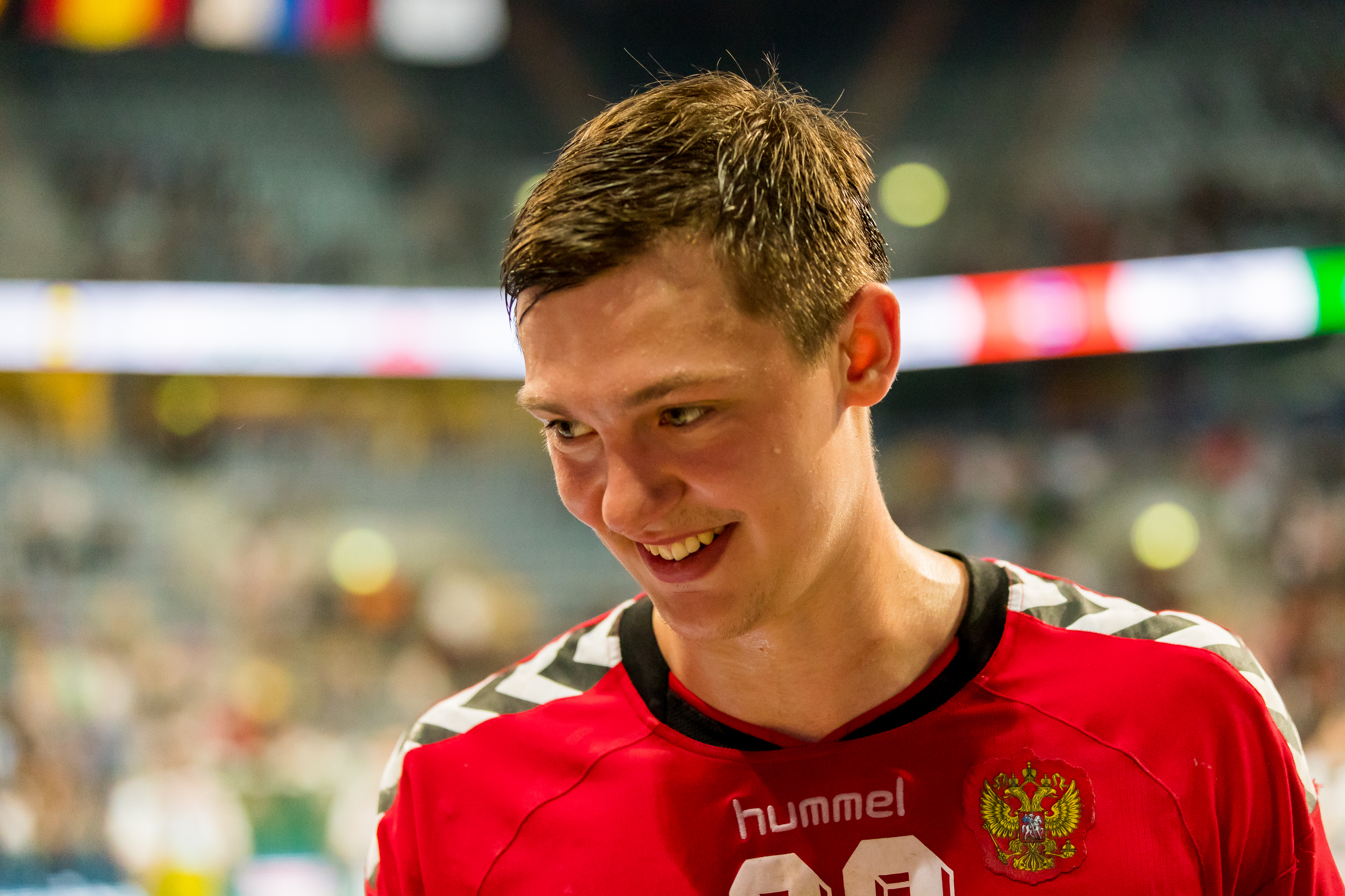 International Handball friendly match between Germany and Russia during Handball Deutschland vs Russland (25:27) at SAP Arena, Mannheim, Baden Württemberg, Germany on 2016-06-08, Photo: Sven Mandel